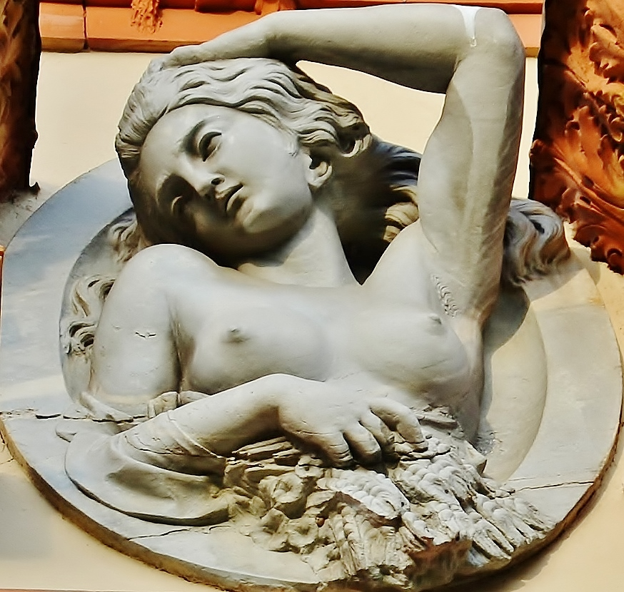 Villa Ghirlanda Silva (solo esterni) This is a photo of a monument which is part of cultural heritage of Italy.